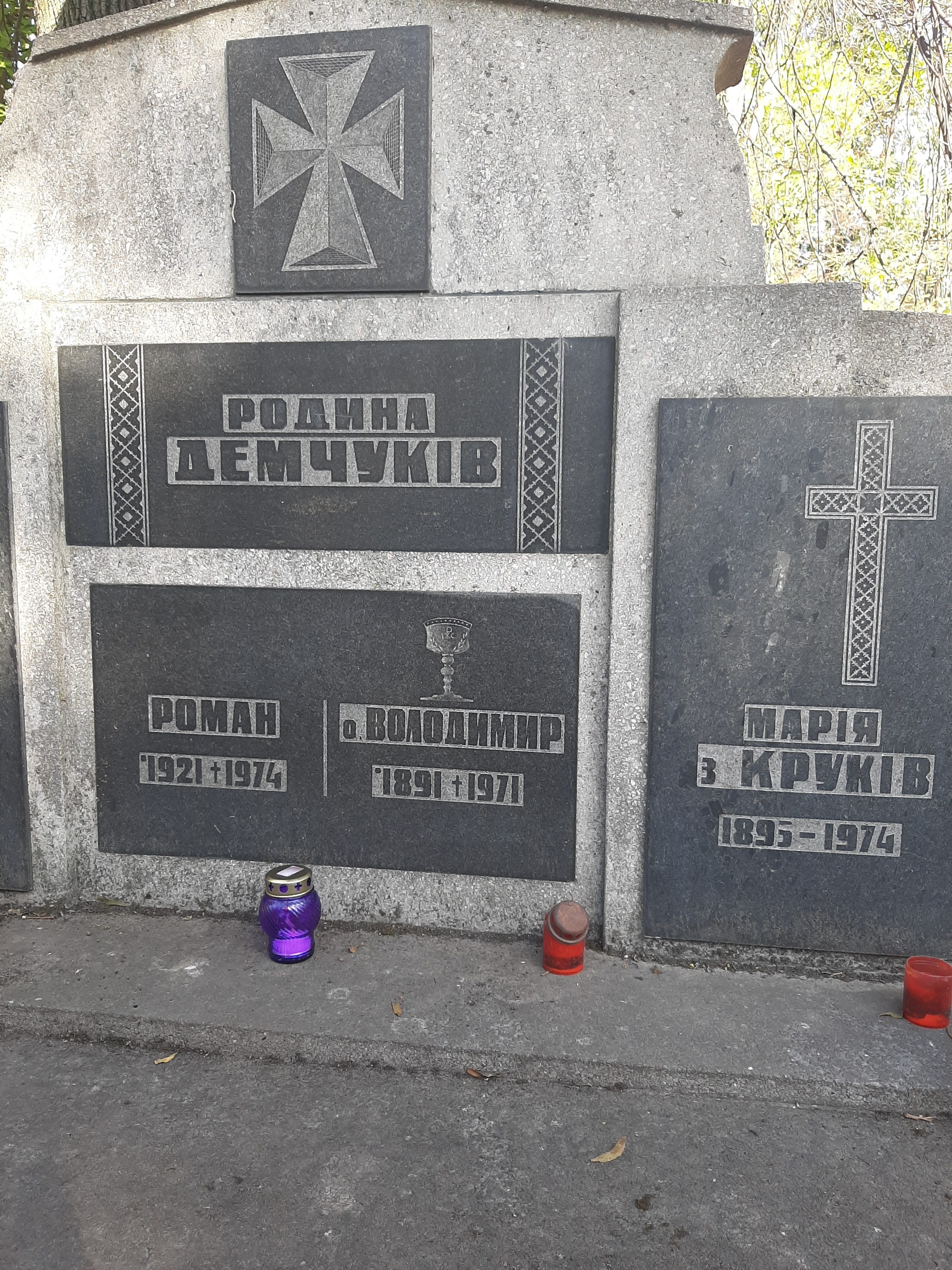 Могила о. Володимира Демчука на Янівському кладовищі, м. Львів, 33 поле